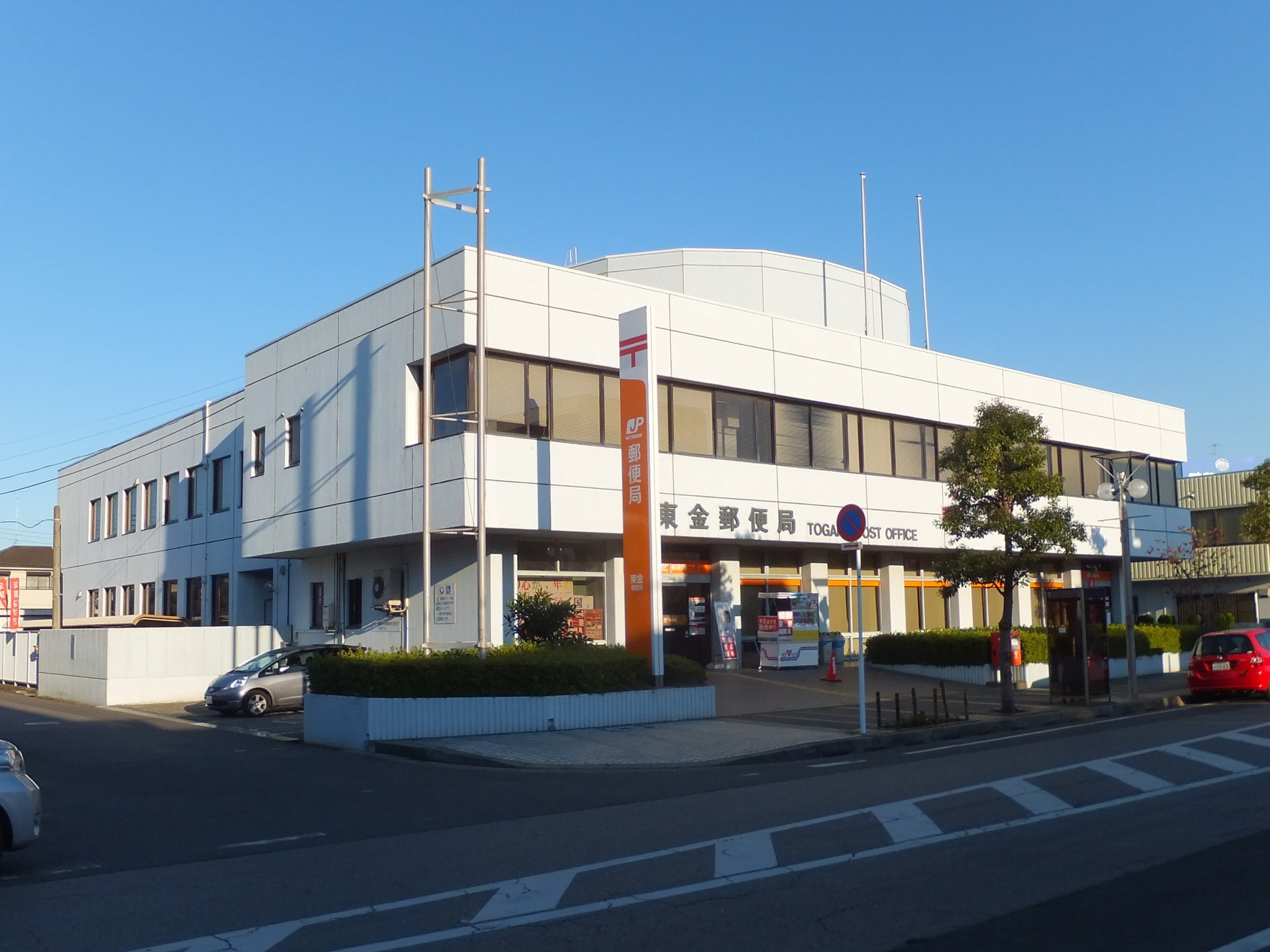 東金郵便局